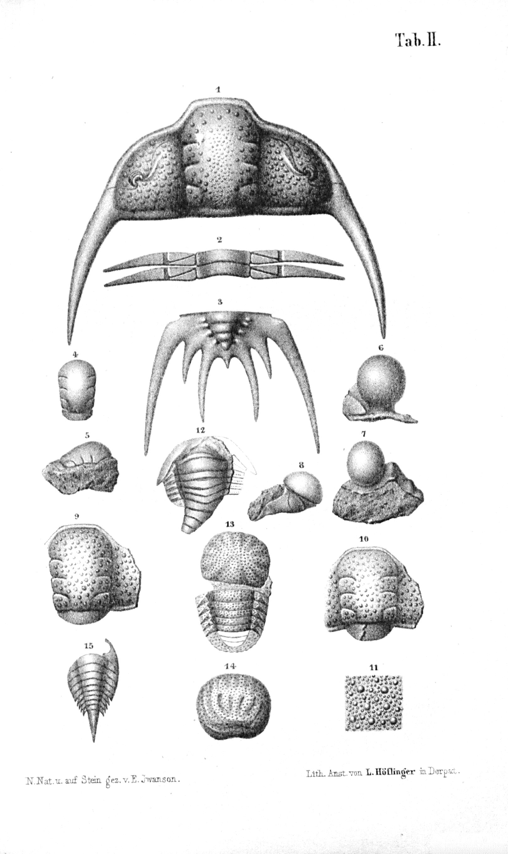 Tafel II Fig. 1 Cheirurus spinulosus, ein vollstaendiger Kopfschild Fig. 2 Zwei Rumpfsegmente derselben Art Fig. 3 Der Schwanzschild derselben Fig. 4 Cheirurus ornatus, Glabella Fig. 5 Dieselbe, von der Seite Fig. 6 Sphaerexochus cranium? eine Glabella Fig. 7 Sphaerexochus pseudohemicranium, Glabella mit dem rechten Wangenschilde, von oben Fig. 8 Dieselbe, von der Seite Fig. 9 Cheirurus ...? s. S. 374, Glabella mit dem Bruchstuecke einer Wange Fig. 10 Cheirurus exsul, Glabella Fig. 11 Verzierung der Schale derselben Art, vergroessert Fig. 12 Exapinurus Schrenkii Fig. 13 Bunodes lunula Fig. 14 Bunodes rugosus Fig. 15 Pseudoniscus aculeatus